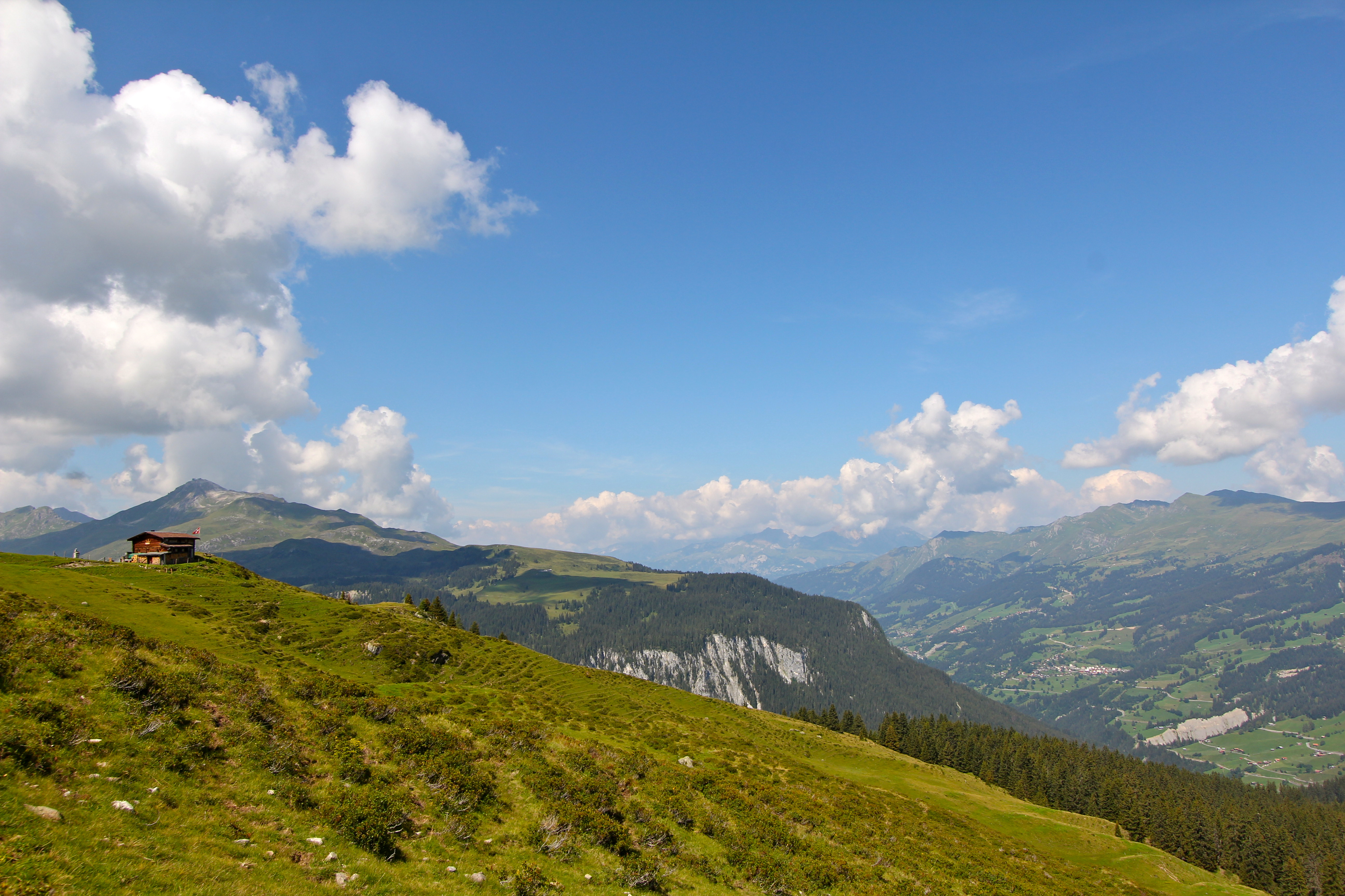 Das Naturfreundehaus Medergerfluh mit dem Aroser Weisshorn (links) und dem Schanfigg (rechts) mit St. Peter-Molinis, am Wegrand des Schanfigger Höhenweges.